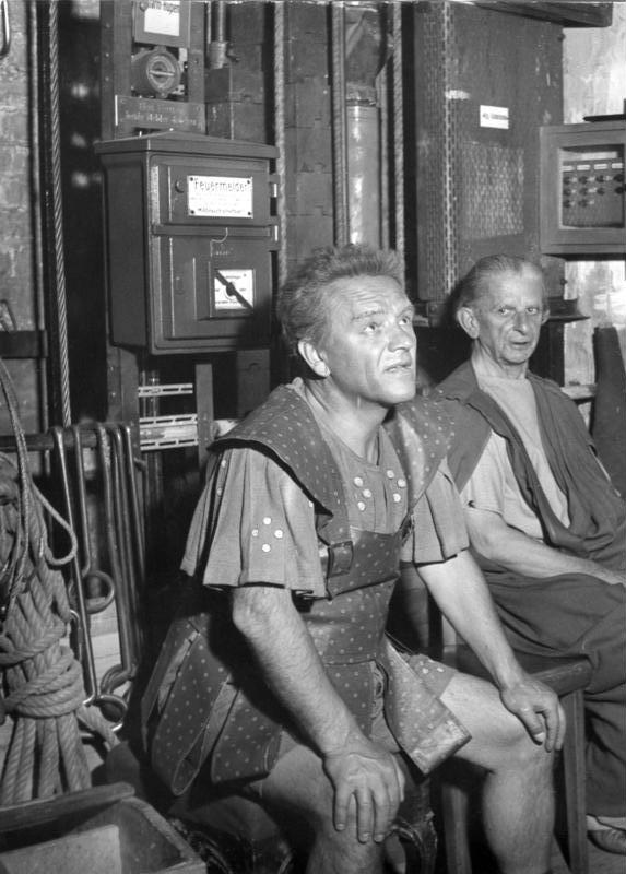 August 1953 Schiller-Theater in Berlin Karl Hellmer als Sosias (Amphitryon) wartet auf sein Stichwort